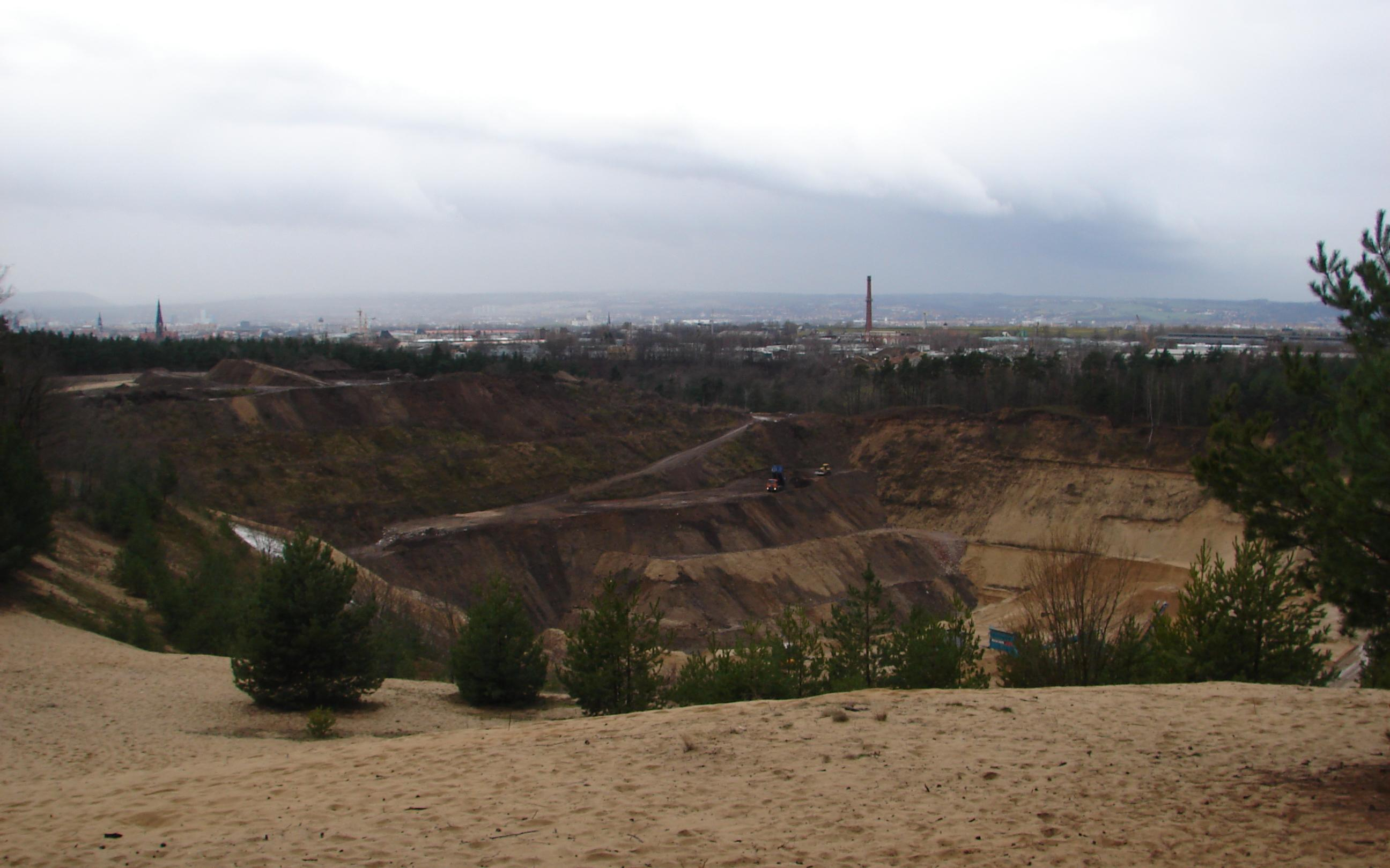 Sandgrube am Kannenhenkel, Dresdner Heide, im Hintergrund Blick über Dresden